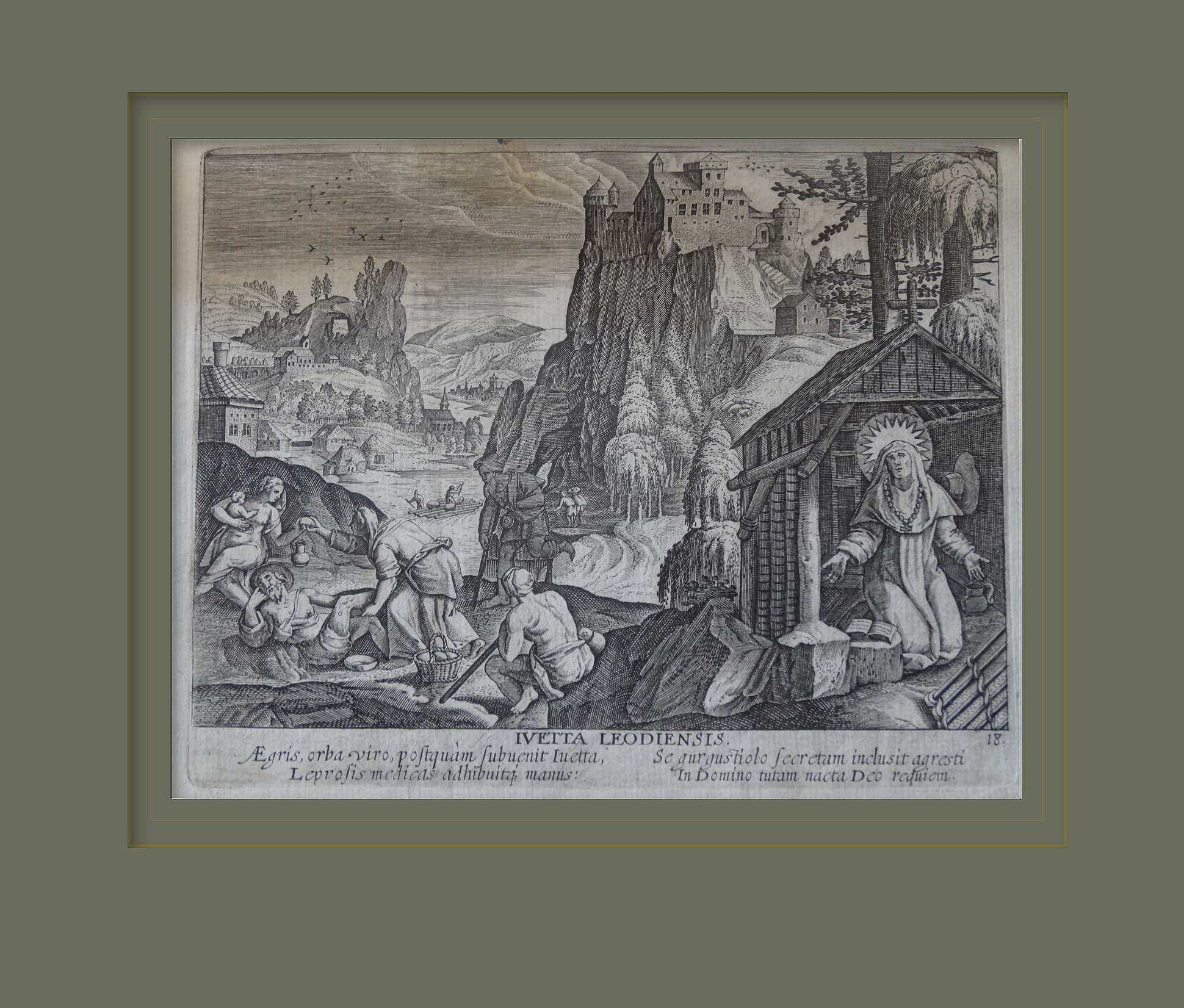 Ivette de Huy (parfois appelée Ivette de Liege) représentée sur cette gravure à l'eau forte de Thomas de Leu (1560-1612). L'oeuvre montre la sainte recluse dans une cabane. Les lépreux qu'elle soigne sont représentés à gauche de l'estampe. Sur un promontoire, à l'emplacement de la citadelle actuelle, la représentation d'un château dont il est déjà fait mention au IXe siècle. (Collection Philcotof - Liege).